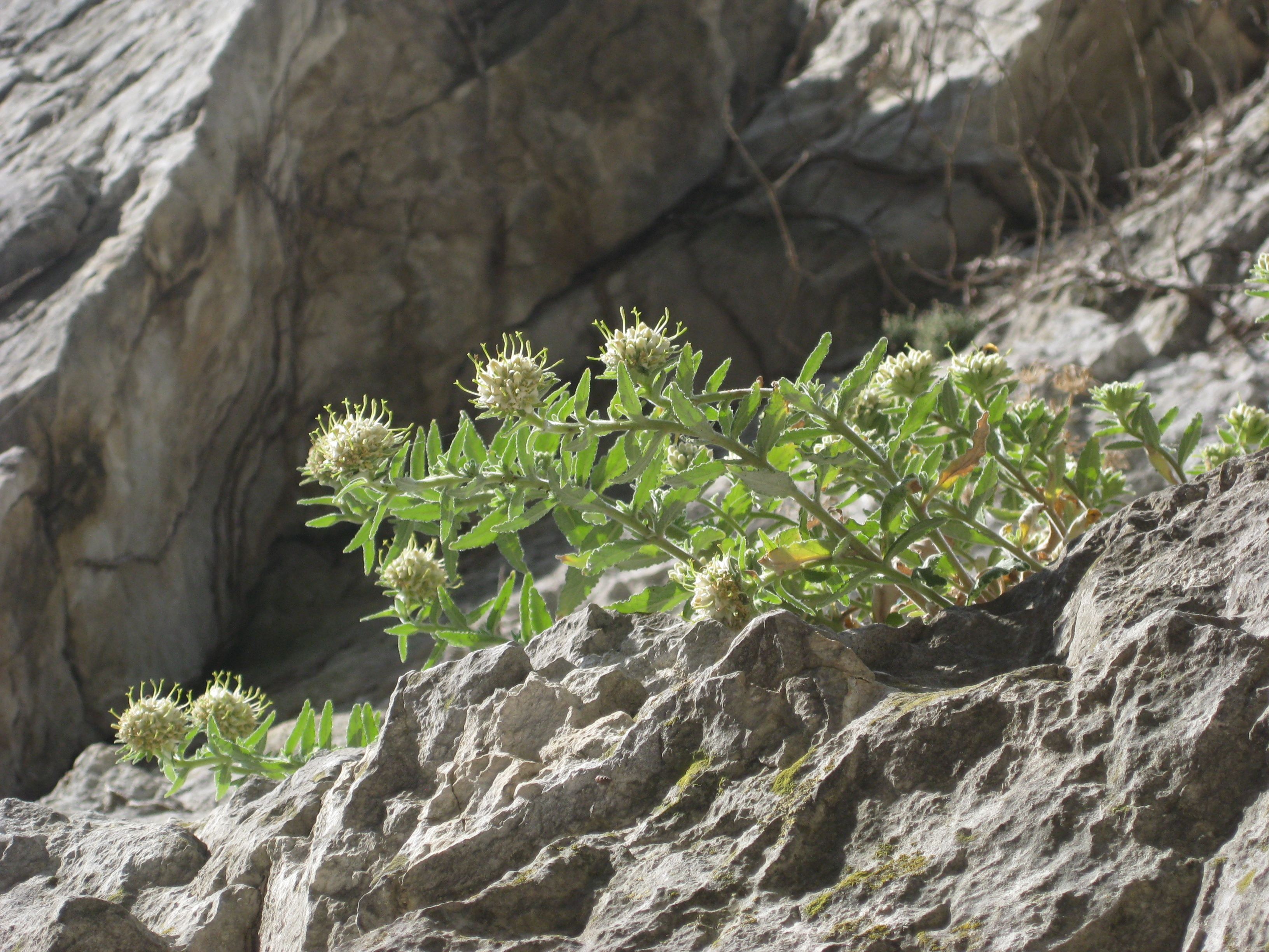 Campanula petraea bei Spiazzi